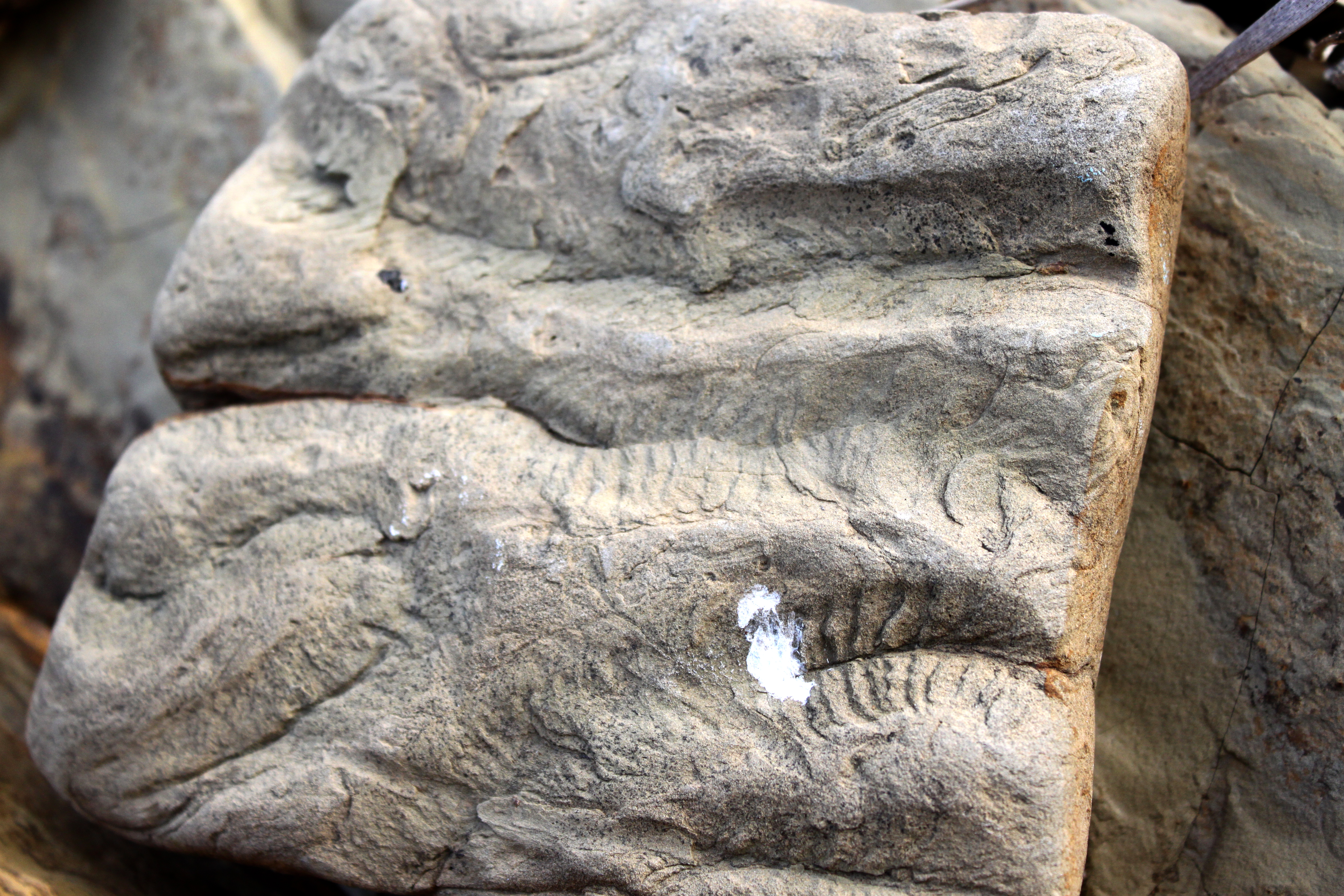 Icnofósil Scolicia en arenisca de los flyschs de punta de San García. Complejos del Campo de Gibraltar, Unidad de Algeciras (Oligoceno-Mioceno). Algeciras, Andalucía, España.